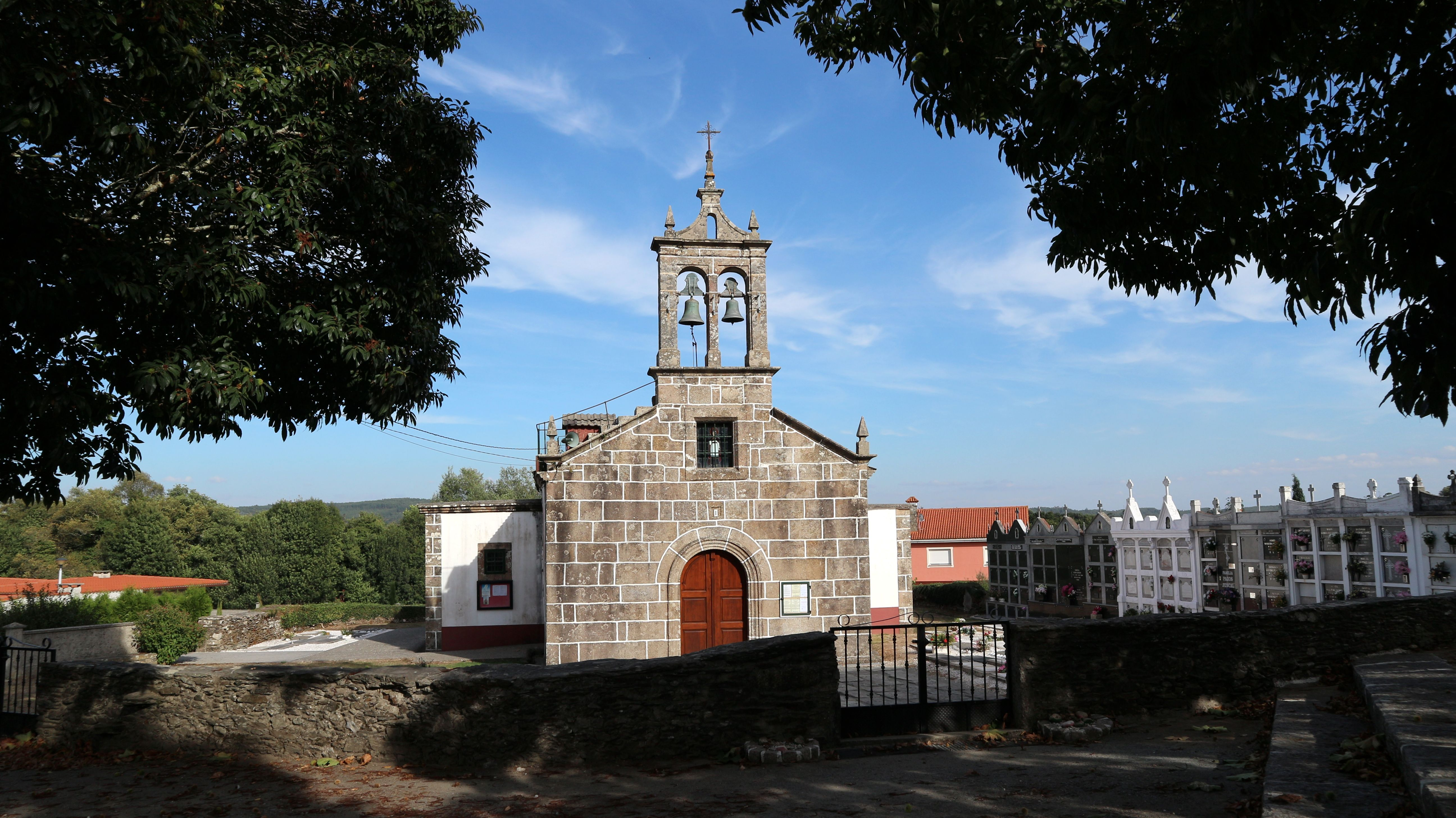 Igrexa de Santa María de Leira. Leira, Ordes.